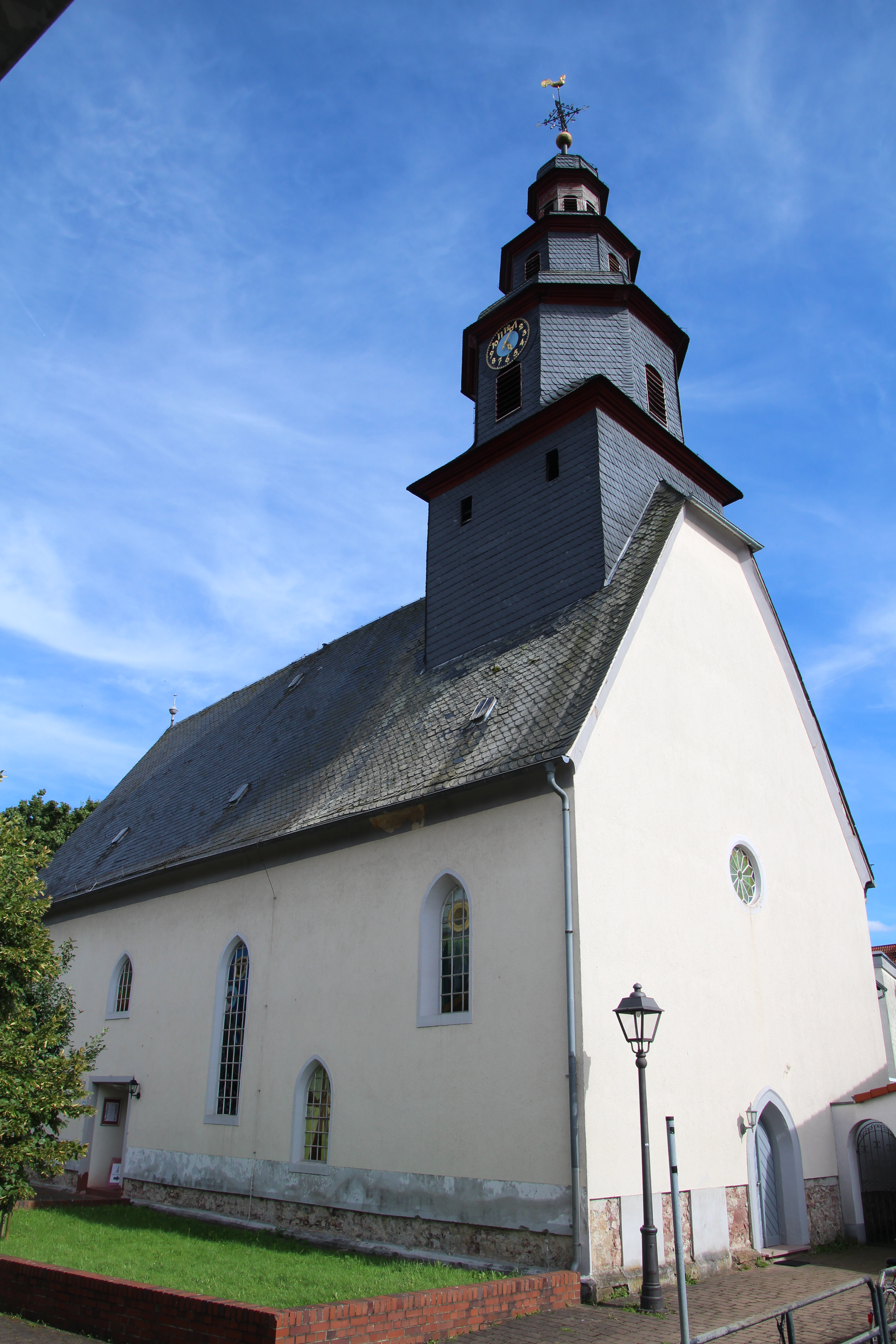 Ev. Kirche